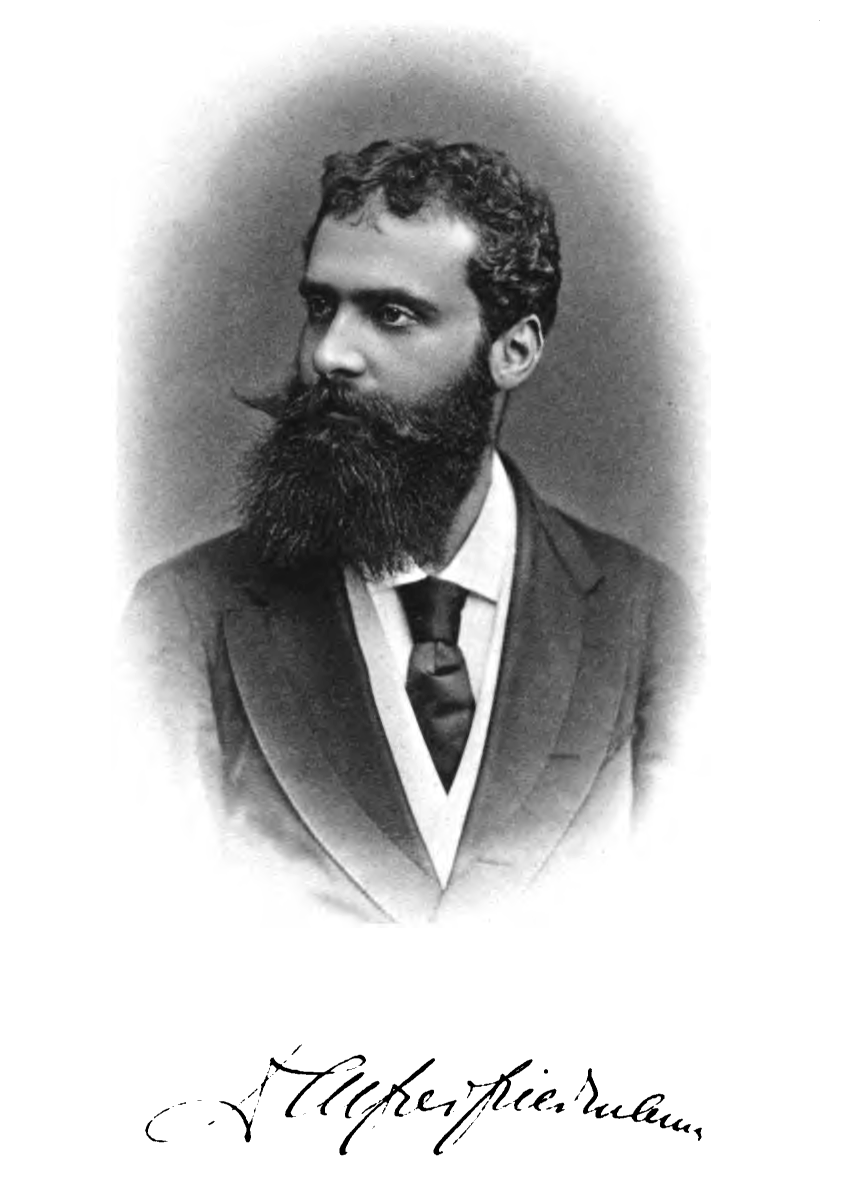 Portrait: Alfred Friedmann. In: Aus Höhen und Tiefen (Ernstes und Profanes). Mit dem Bilde des Verfassers. J. C. C. Bruns, Minden i. Westf. 1886